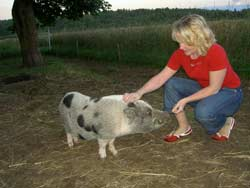 Källa